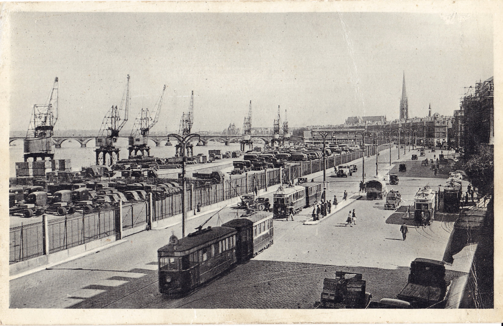 Carte postale ancienne éditée par Cigogne, n°140 :BORDEAUX - Les Quais rive gauche